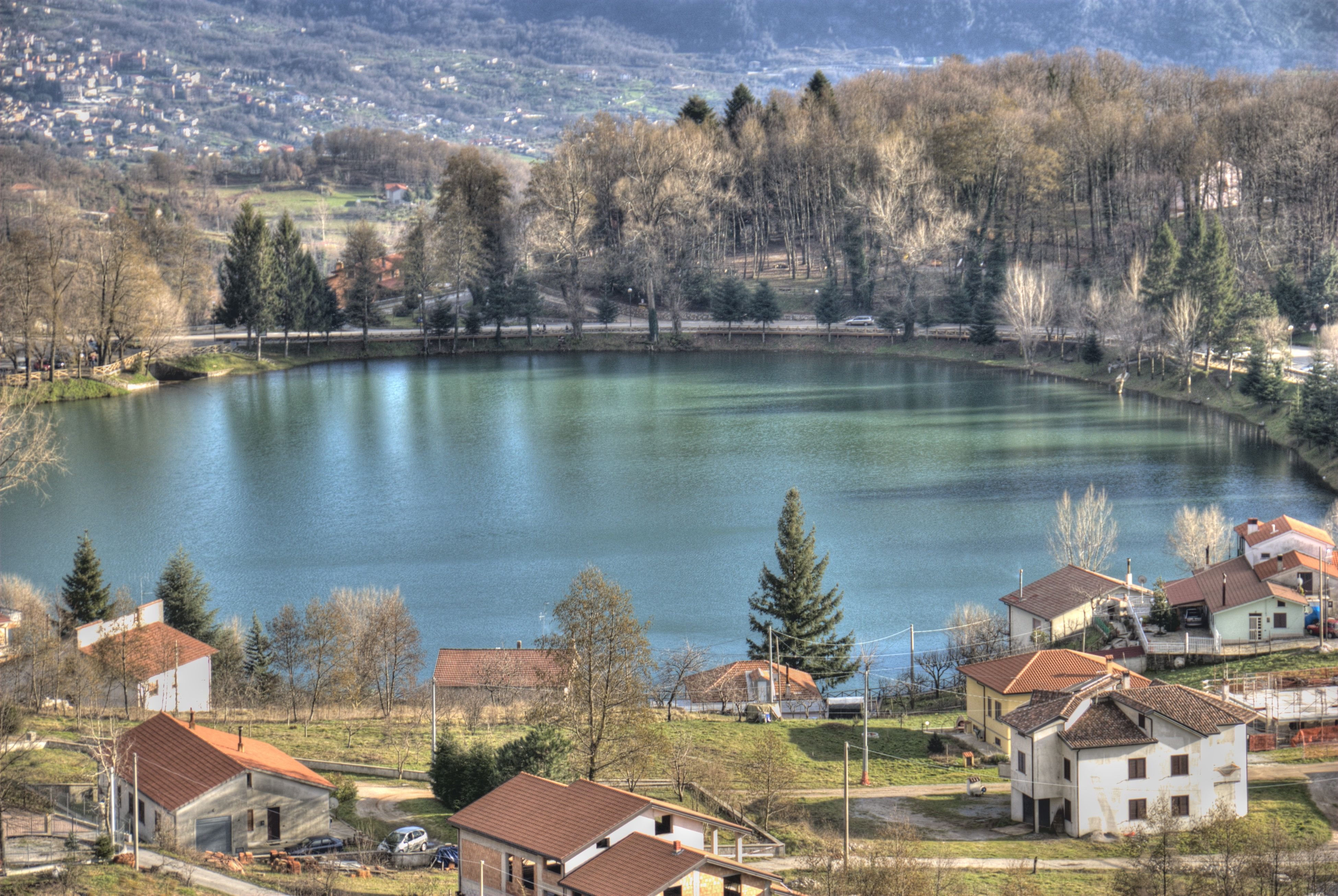 Lago Sirino fotografato al volo dall'autostrada